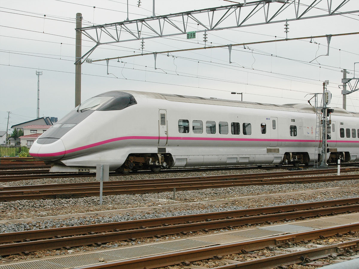 Akita Shinkansen Komachi at Omagari station. 2005/09/18